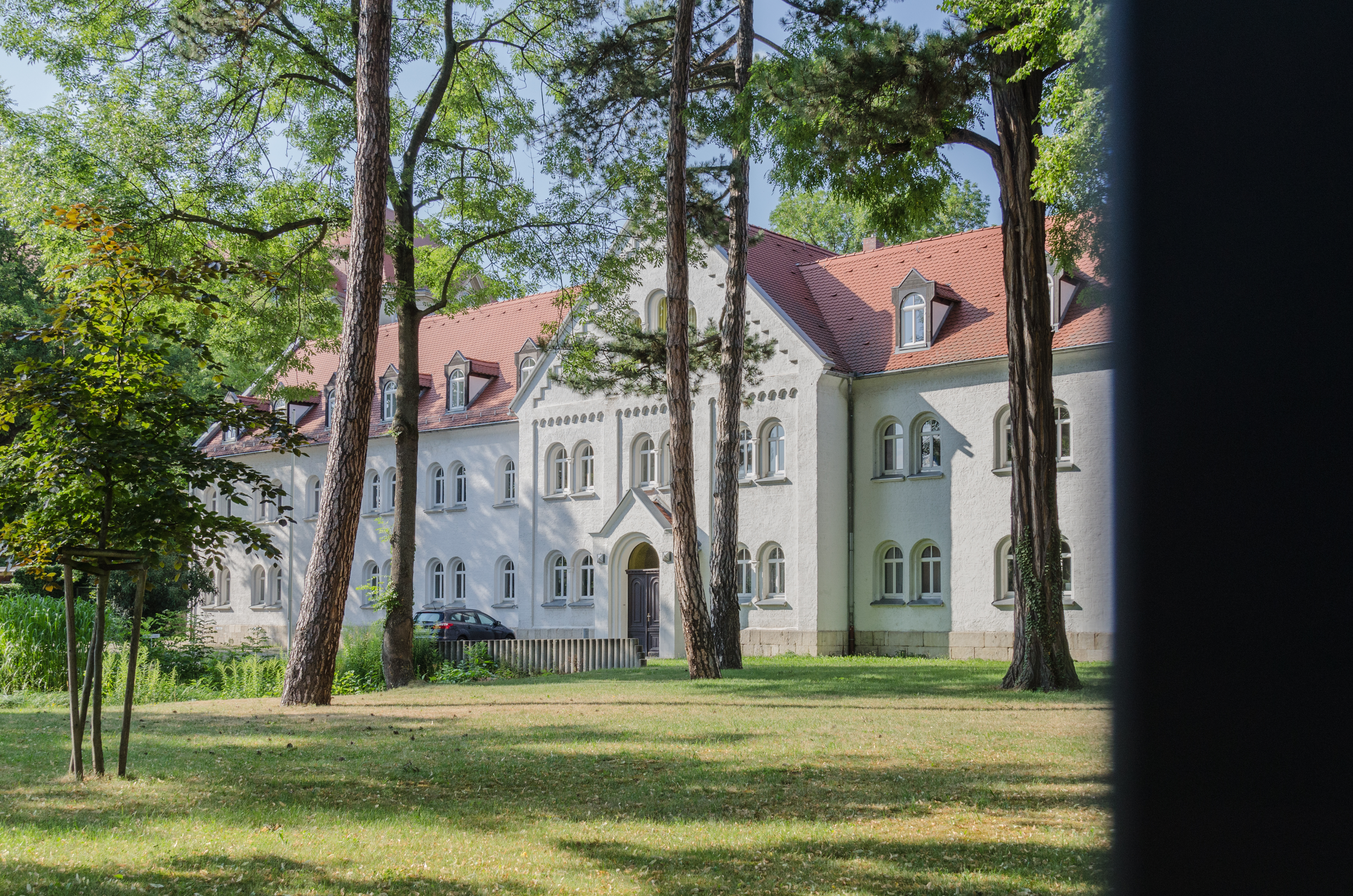 Naumburg, Hinter dem Dom 1